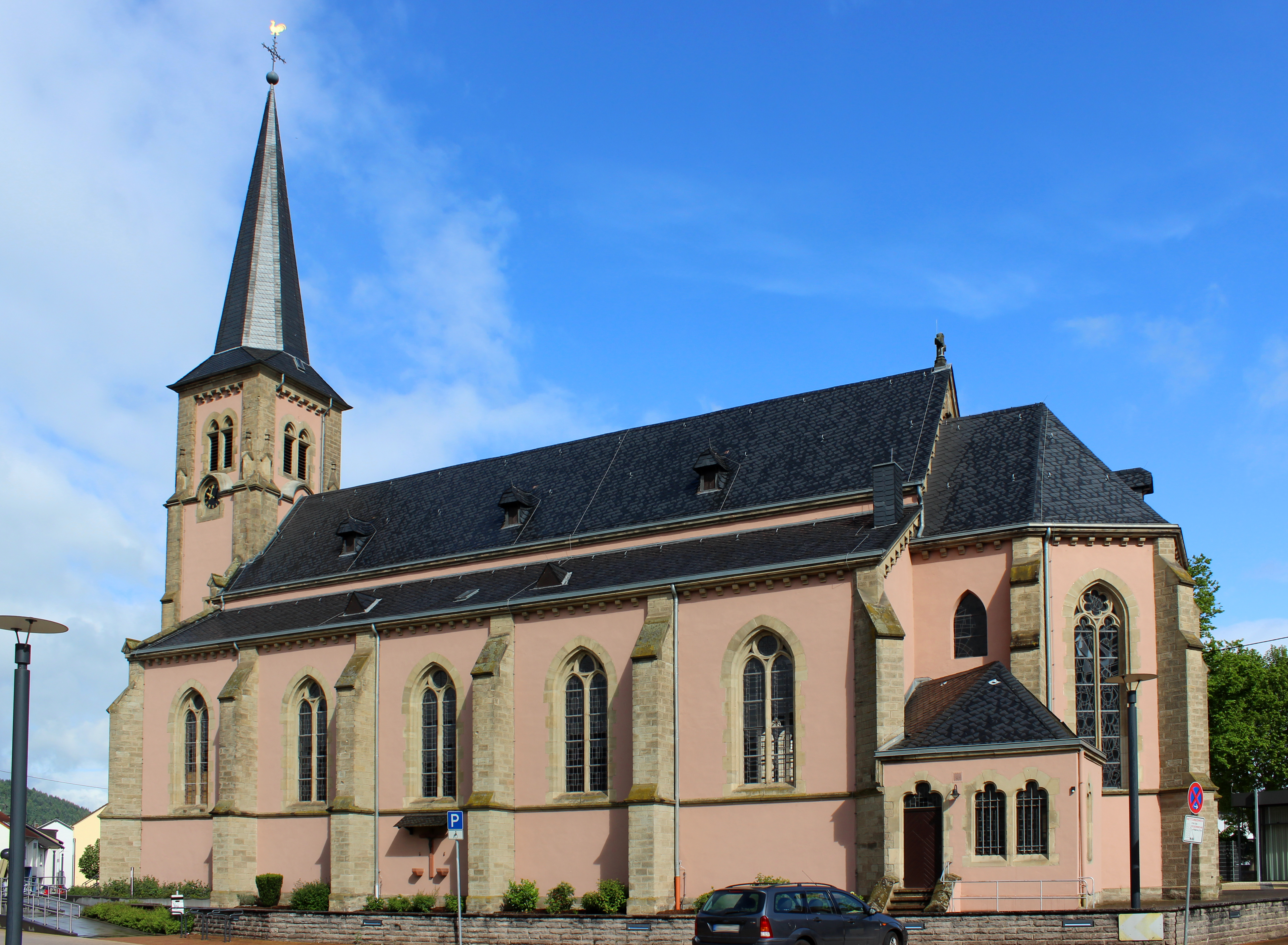 Die katholische Pfarrkirche St. Maximin in Pachten, einem Stadtteil von Dillingen, Landkreis Saarlouis, Saarland.